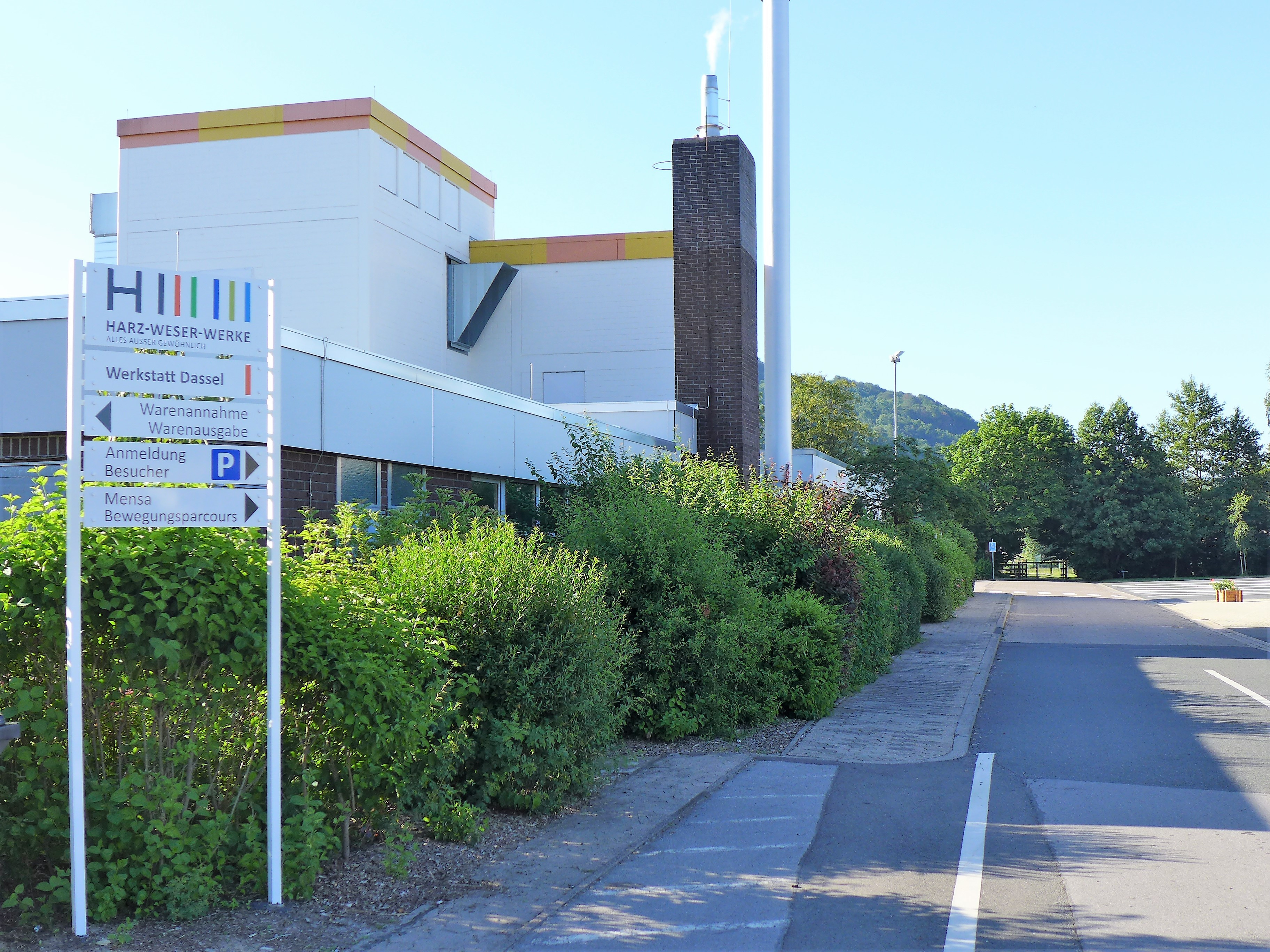 nordwestliche Ansicht mit Maschweg